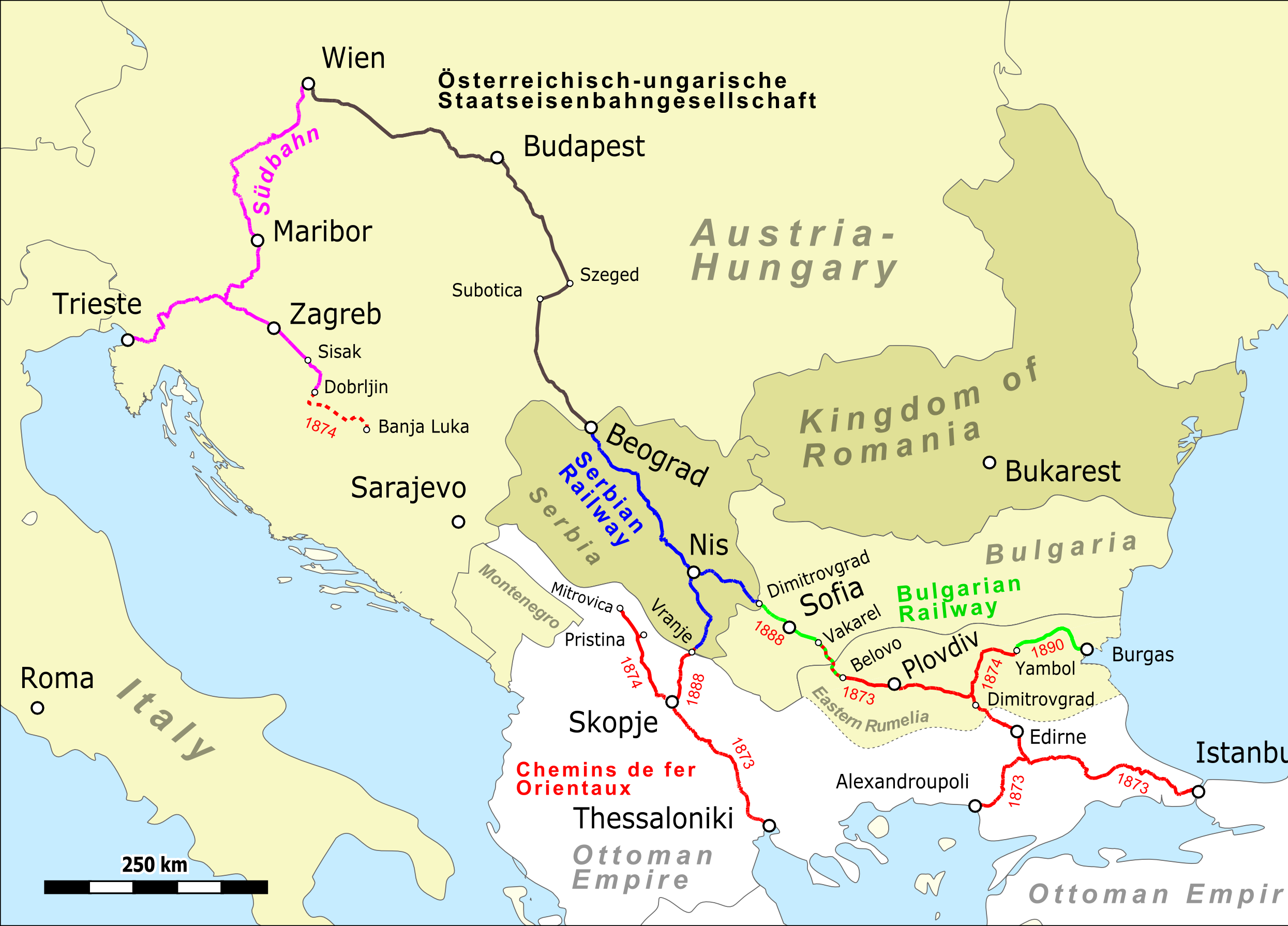 1888 fertig gestellte Verbindung Wien–Instanbul und Strecken der Chemins de fer Orientaux (Orientbahn). Englischer Text